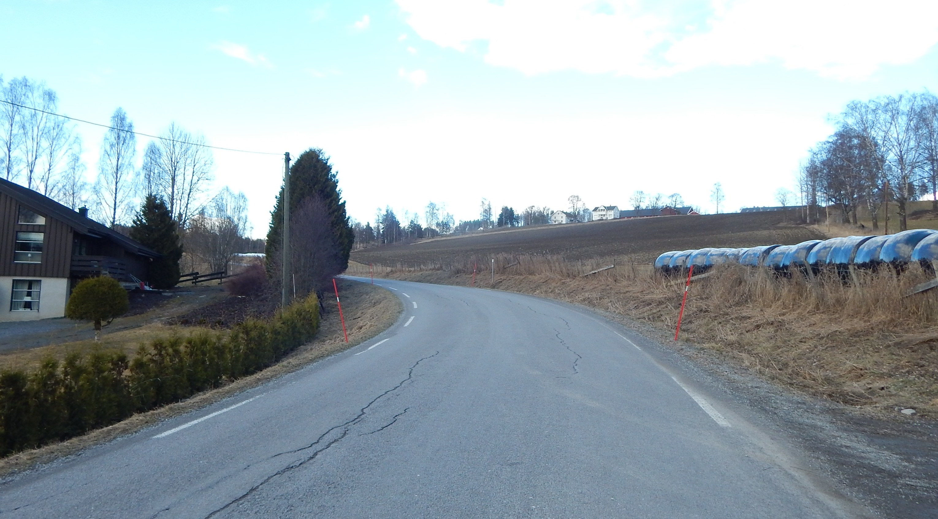 Grindvolinna (fylkesvei 2278, tidl. 1) like ovenfor Sløvika